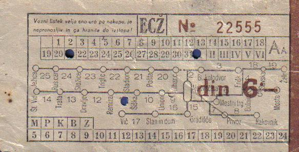 Slika tramvajske karte, s katero se je moj oče okoli leta 1950 peljal iz Centra v Šiško.